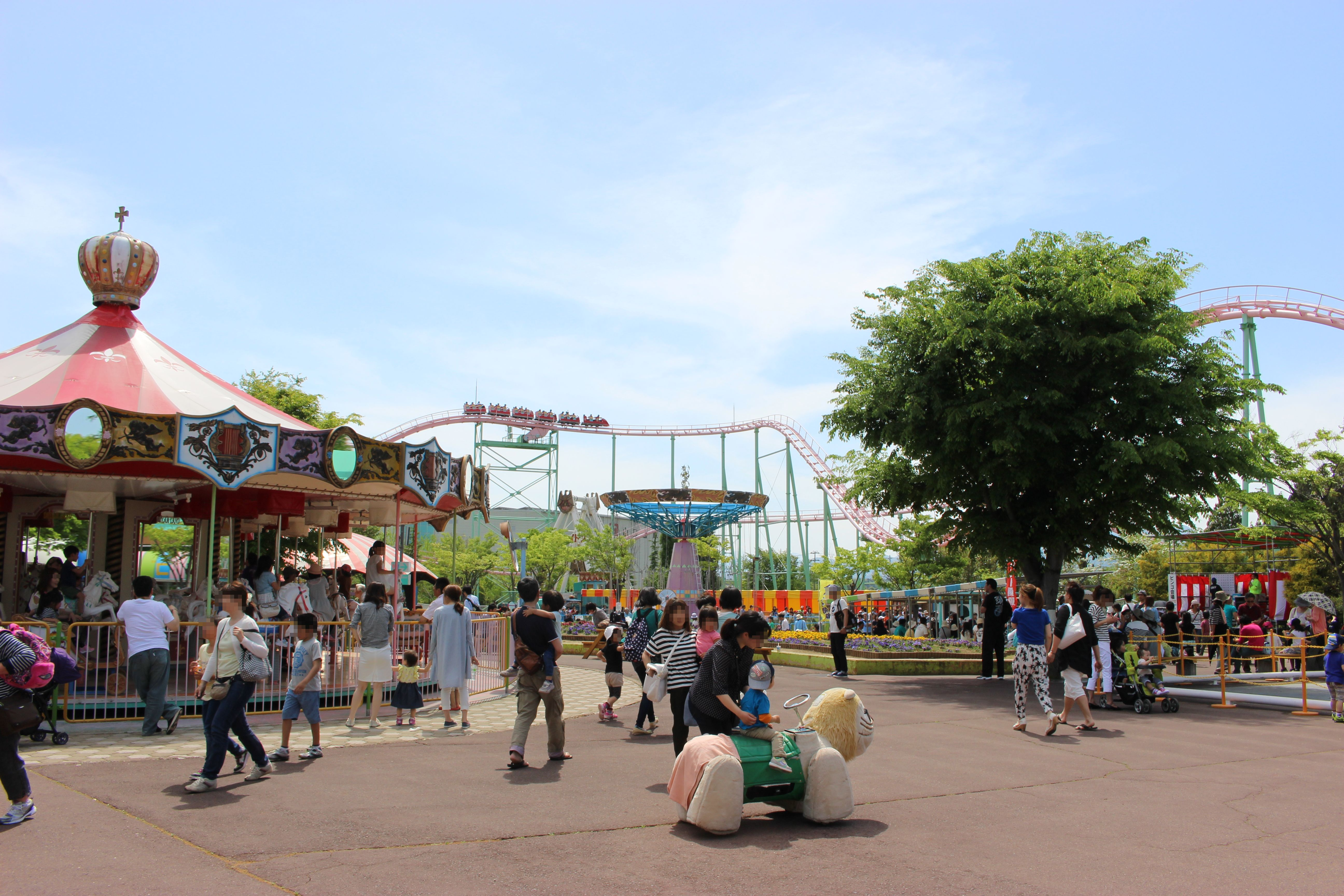 郡山カルチャーパーク・ドリームランド